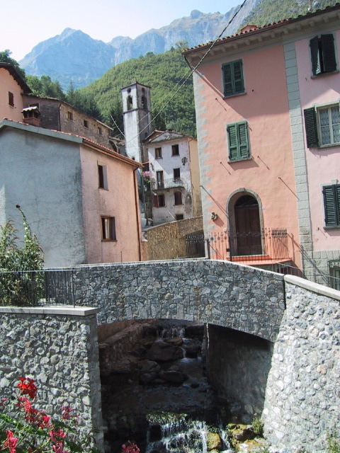 Fornovolasco, Vergemoli, Toscana, ItaliaGARFAGNANA, FORNOVOLASCO